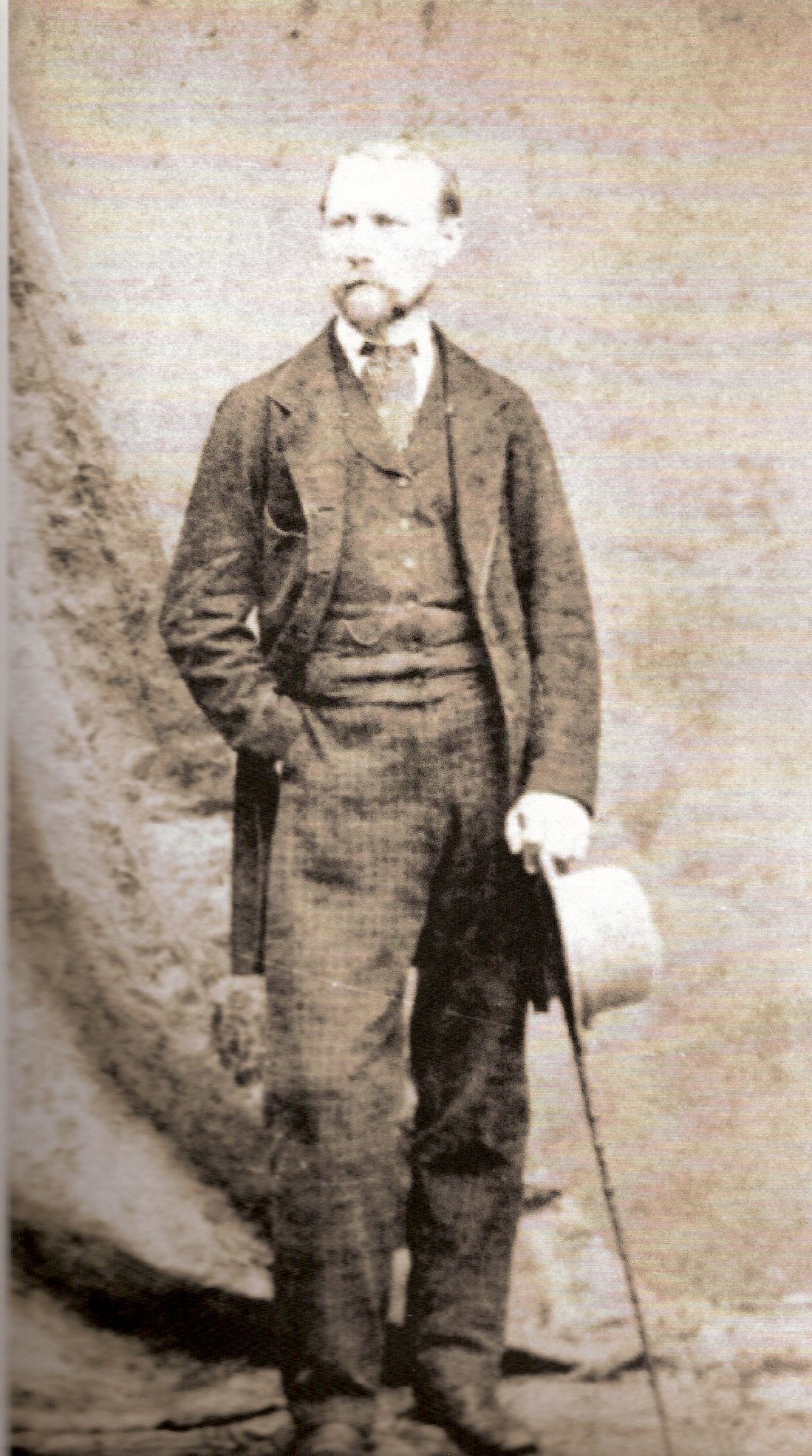 Andrzej Kotula - polski prawnik, działacz narodowy na Śląsku Cieszyńskim.